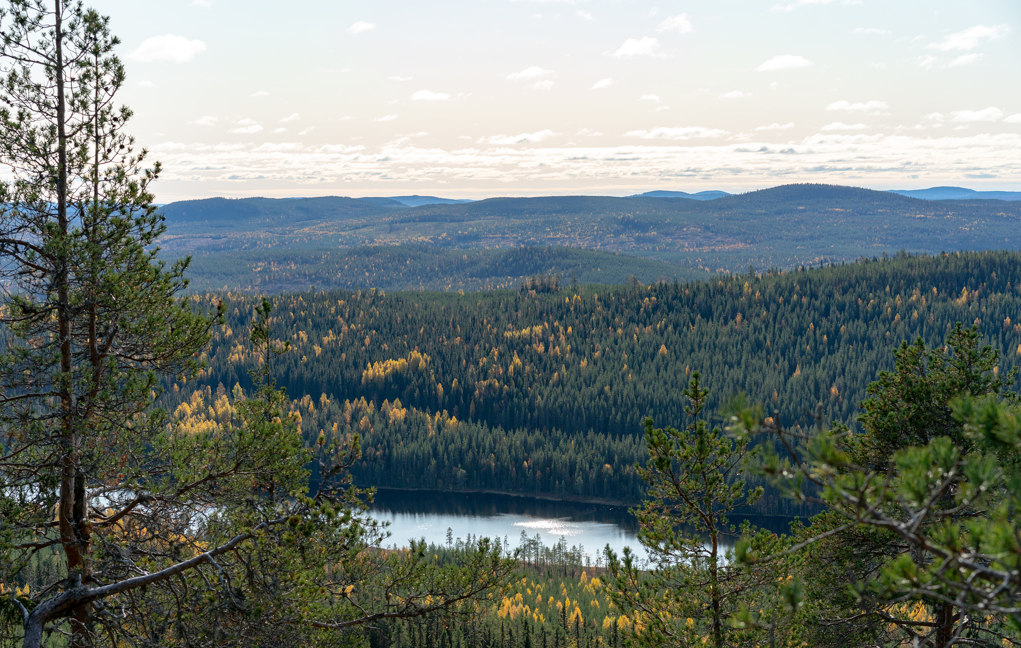 Utsikt mot söder från södra sidan av topplatån på Gammtratten. Sjön är Trattbergssjön.